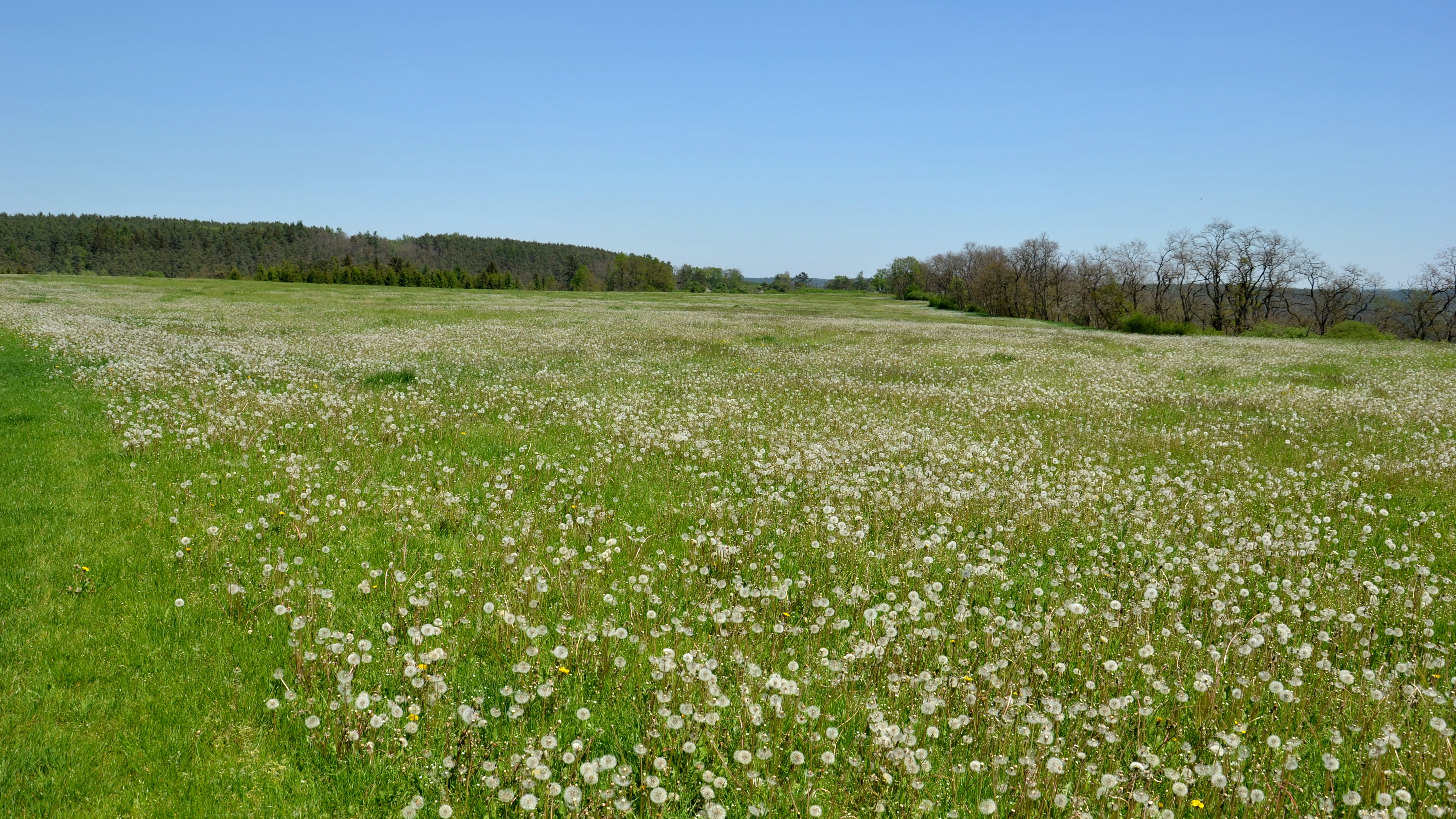 Dolní Hradiště – celkový pohled na lokalitu slovanského hradiště od západu